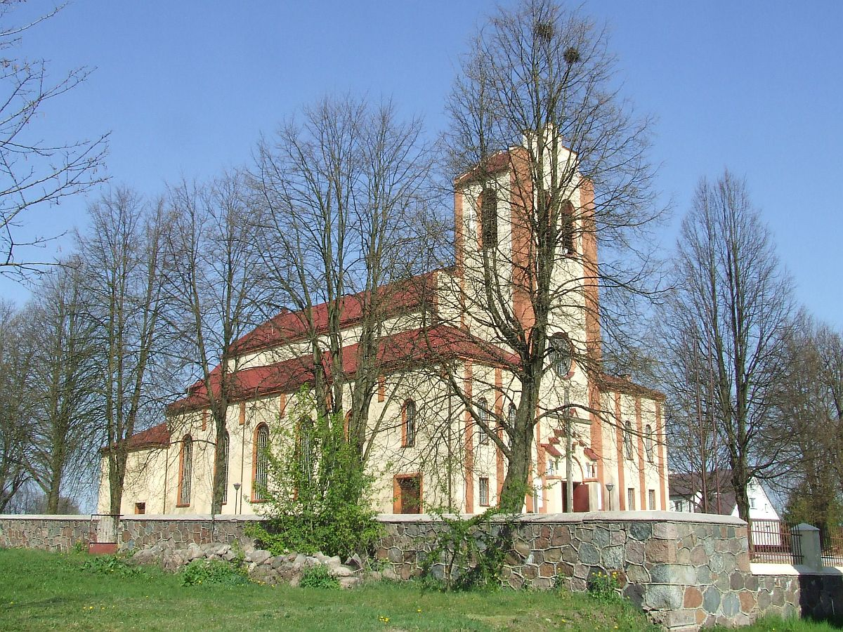 Zawady (gmina Zawady), church